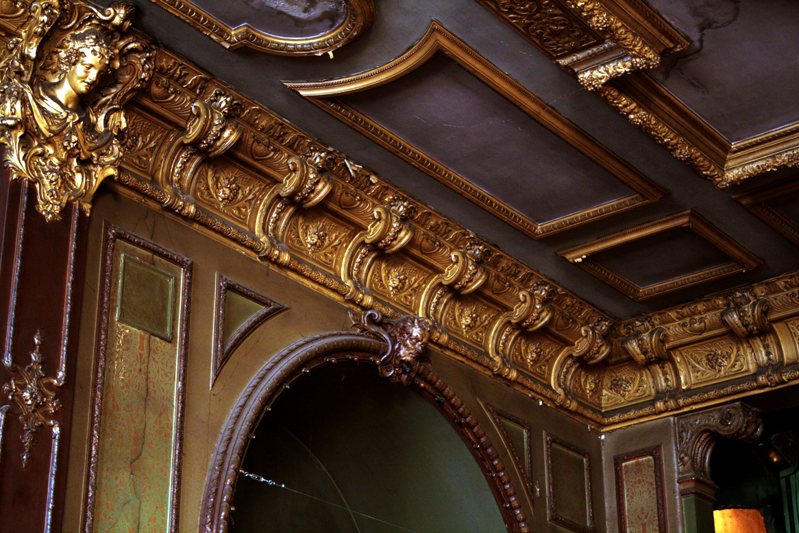 Clärchens Ballhaus, Spiegelsaal